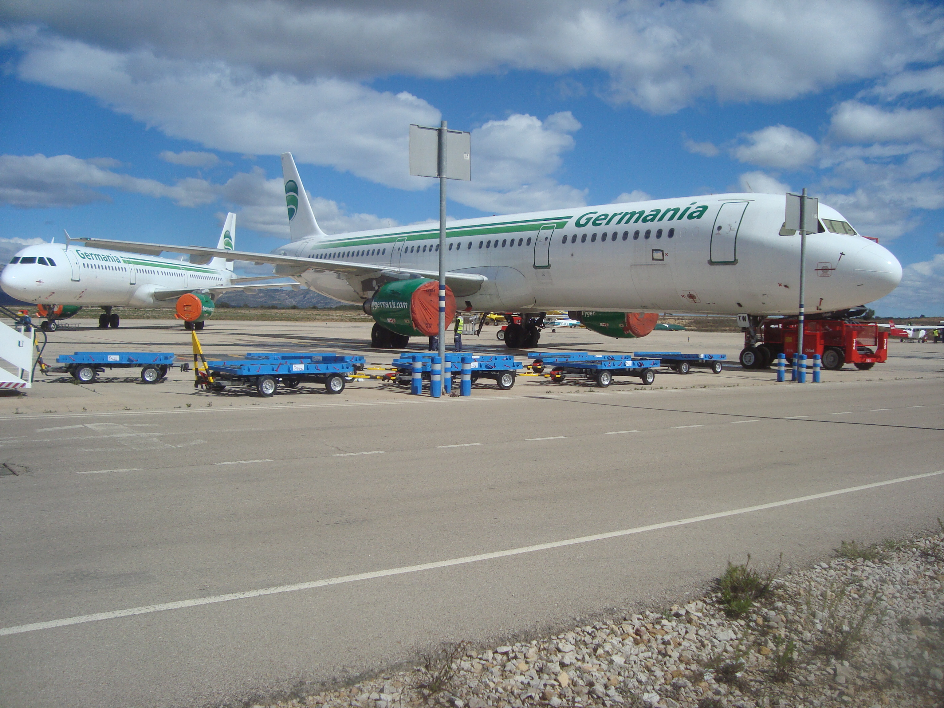 Aviones Airbus de la aerolínea Germania. Aeropuerto de Castellón​- Costa Azahar (código IATA: CDT, código OACI: LECH)